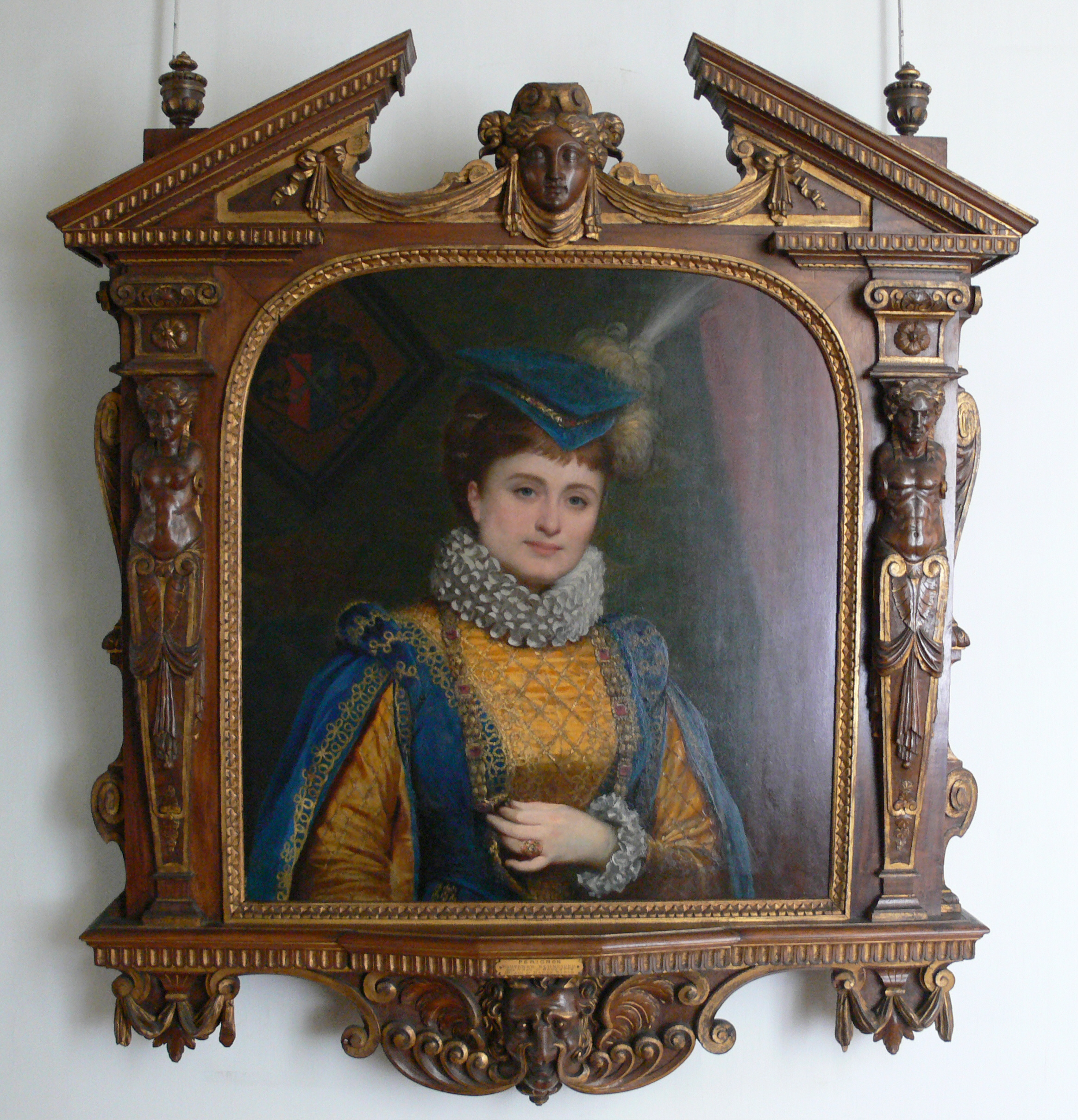 Alexis-Joseph Perignon: La chanteuse Hortense Schneider dans le rôle de Boulotte de „Barbe-Bleue“ (musique de Jacques Offenbach , 1866); huile sur toile. Musée du Second Empire, Château de Compiègne, France.